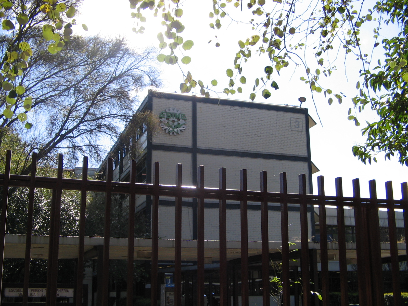 Escuela Superior de Ingeniería Mecánica y Eléctrica Zacatenco (ESIME) edificio 3